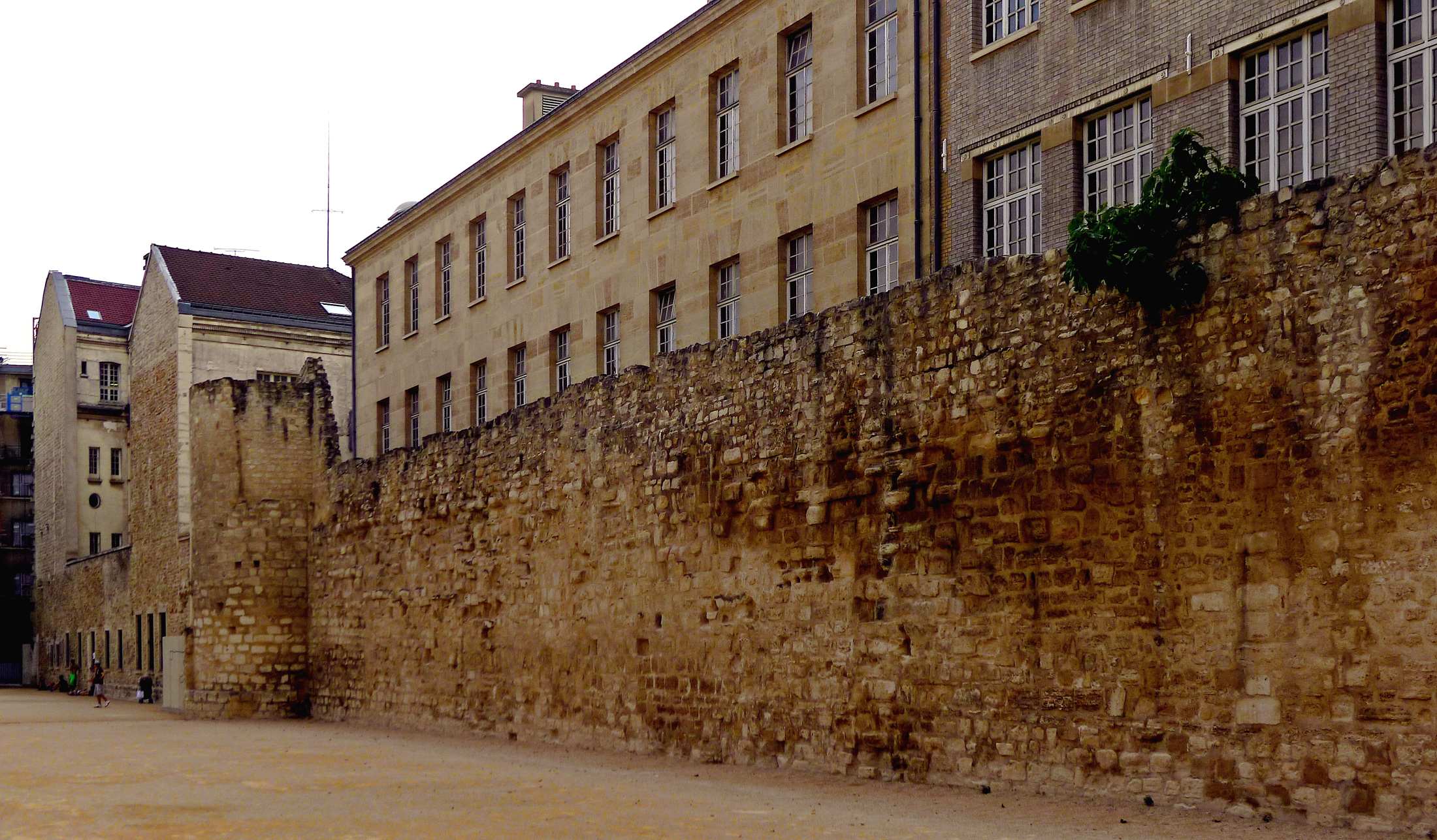 Enceinte de Philippe-Auguste (rue des Jardins-Saint-Paul) - Paris IV .